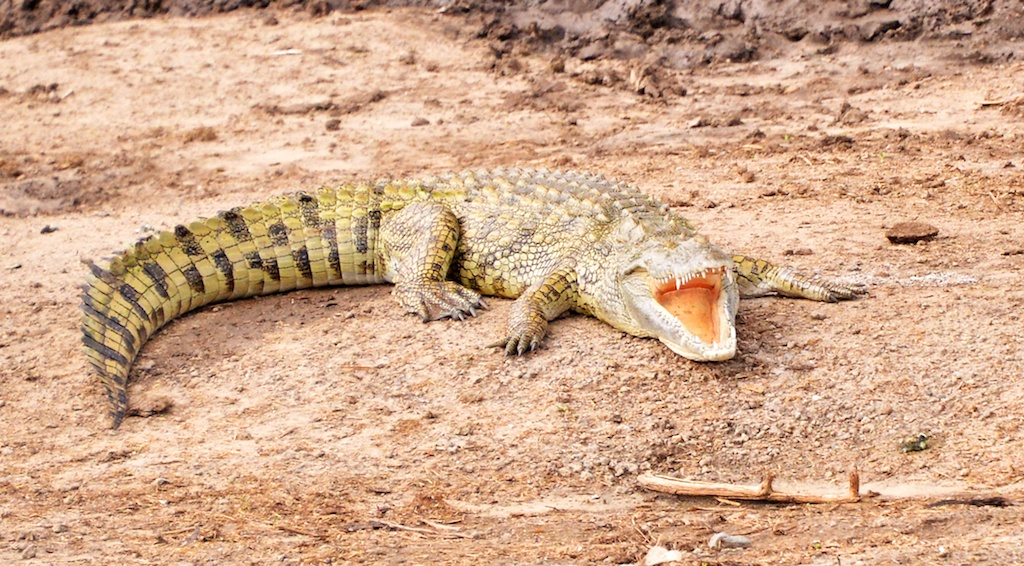 Nile Crocodile, Uganda